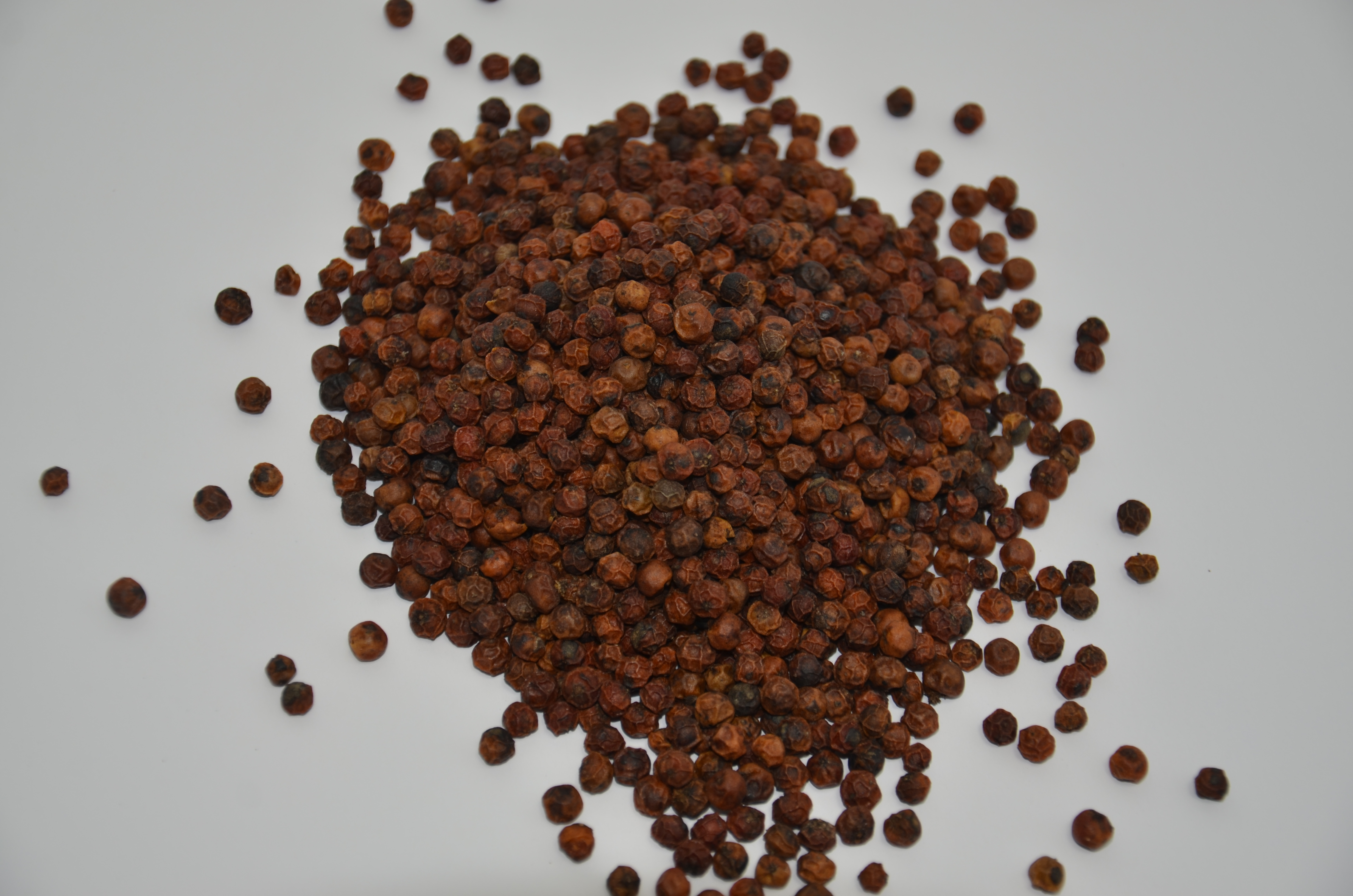 De roodbruine gedroogde rijpe peperbessen van de Piper nigrum. Afkomstig uit Cambodja (Kampot)